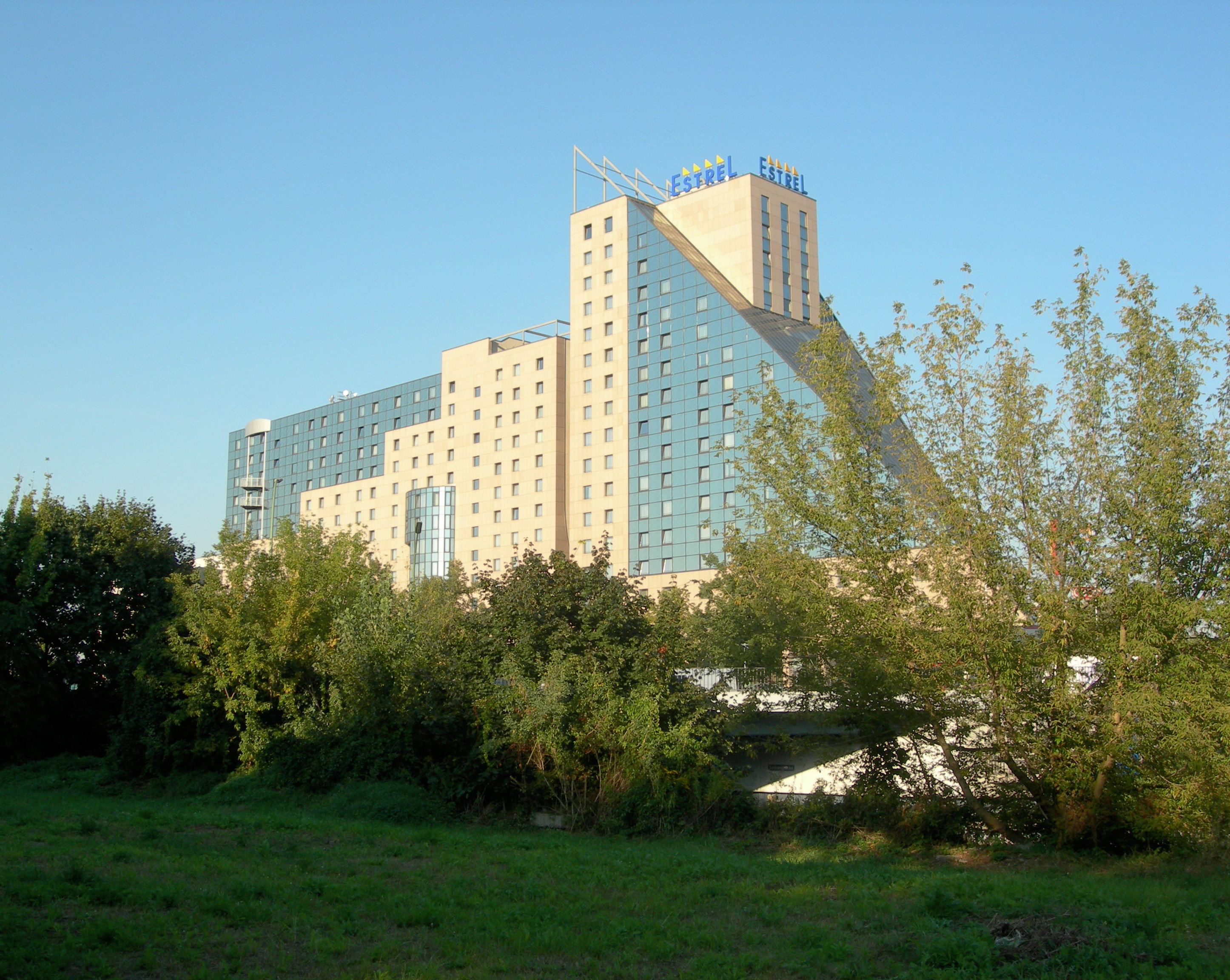 Estrel Hotel in Berlin-Neukölln, 2005. Photographer: Rainer Zenz